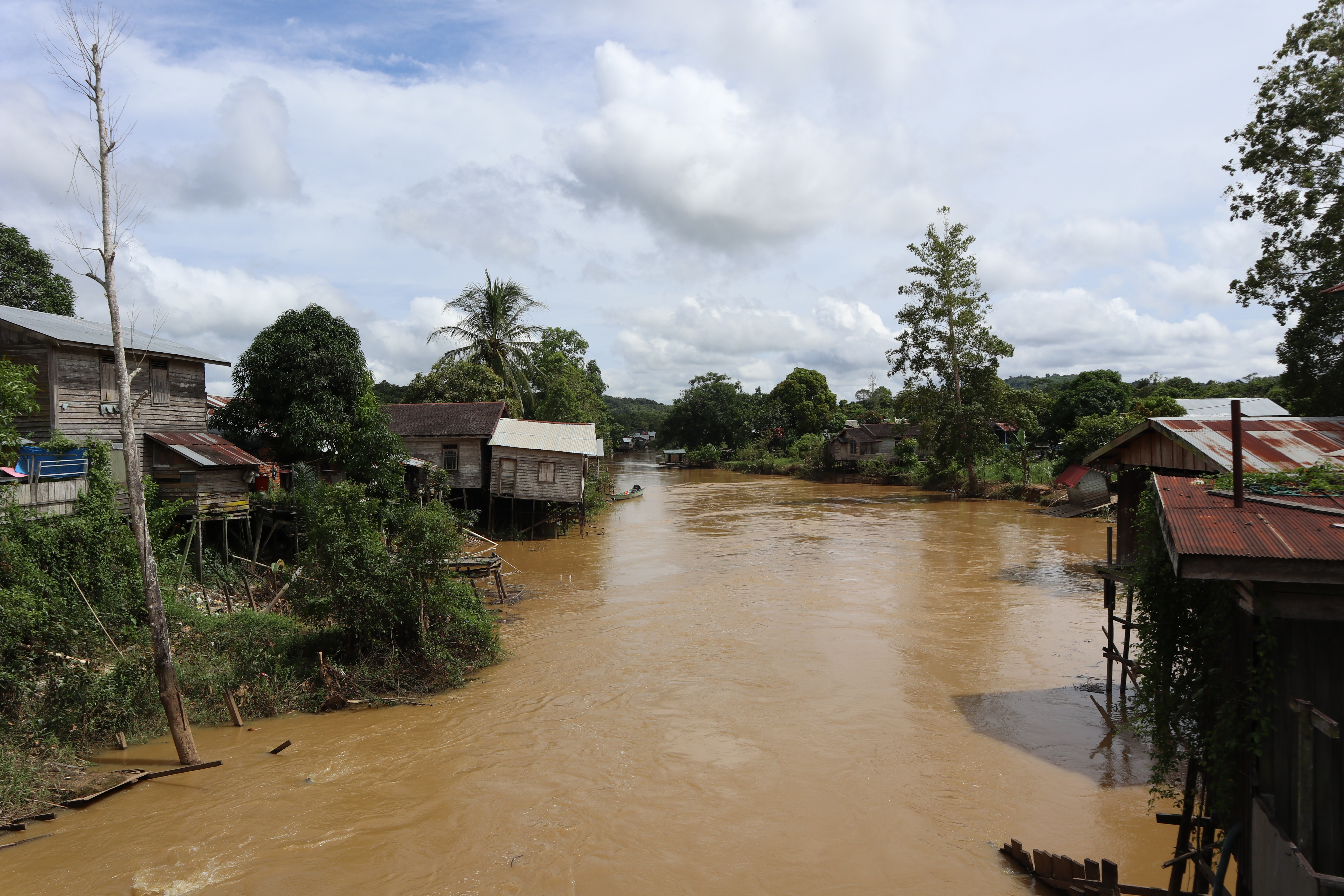 Sungai Jembayan, anak sungai Mahakam yang mengaliri beberapa desa di kecamatan Loa Kulu (Kabupaten Kutai Kartanegara, Kalimantan Timur).